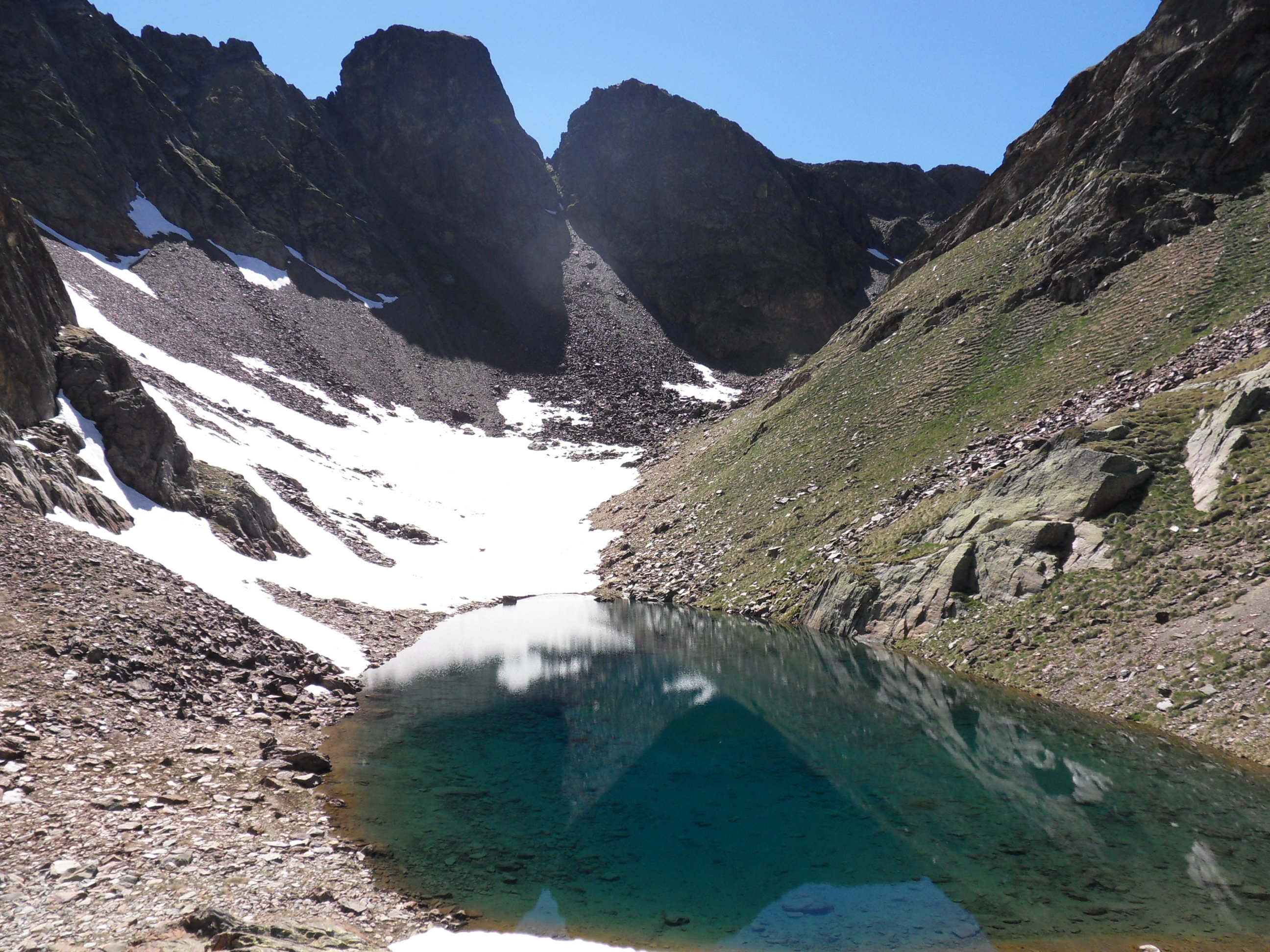 Etang de la Canalbonne juin 2011 2503m